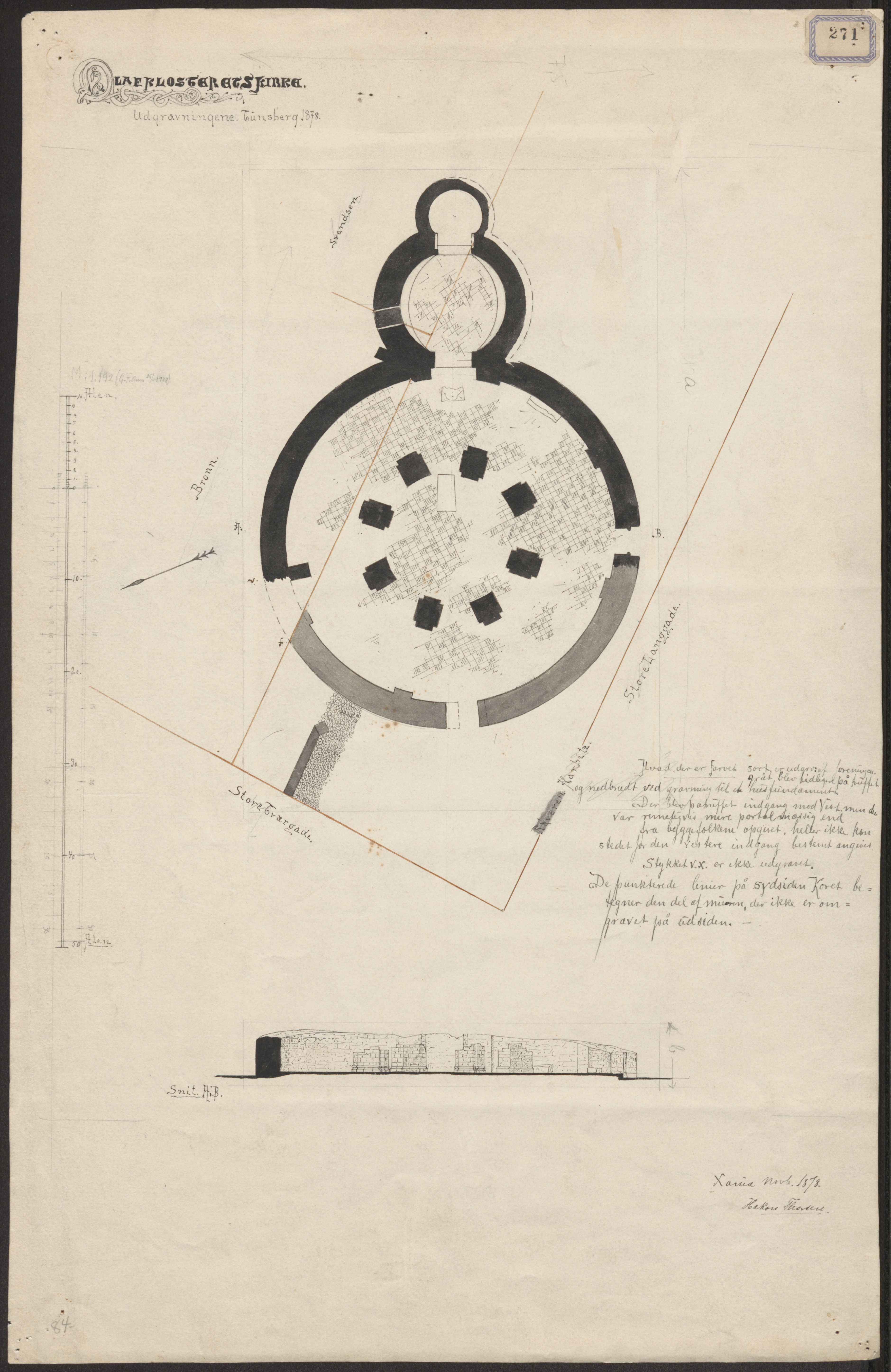 Bildet er hentet fra Riksantikvaren. Grunnplan og snitt A-B (FF.kat.nr. 271) Eier : Fortidsminneforeningen Sted : Norway, Vestfold, Tønsberg Emneord: STEINKIRKER, ARKITEKTURTEGNINGER, PLANTEGNINGER Medium : Tusj